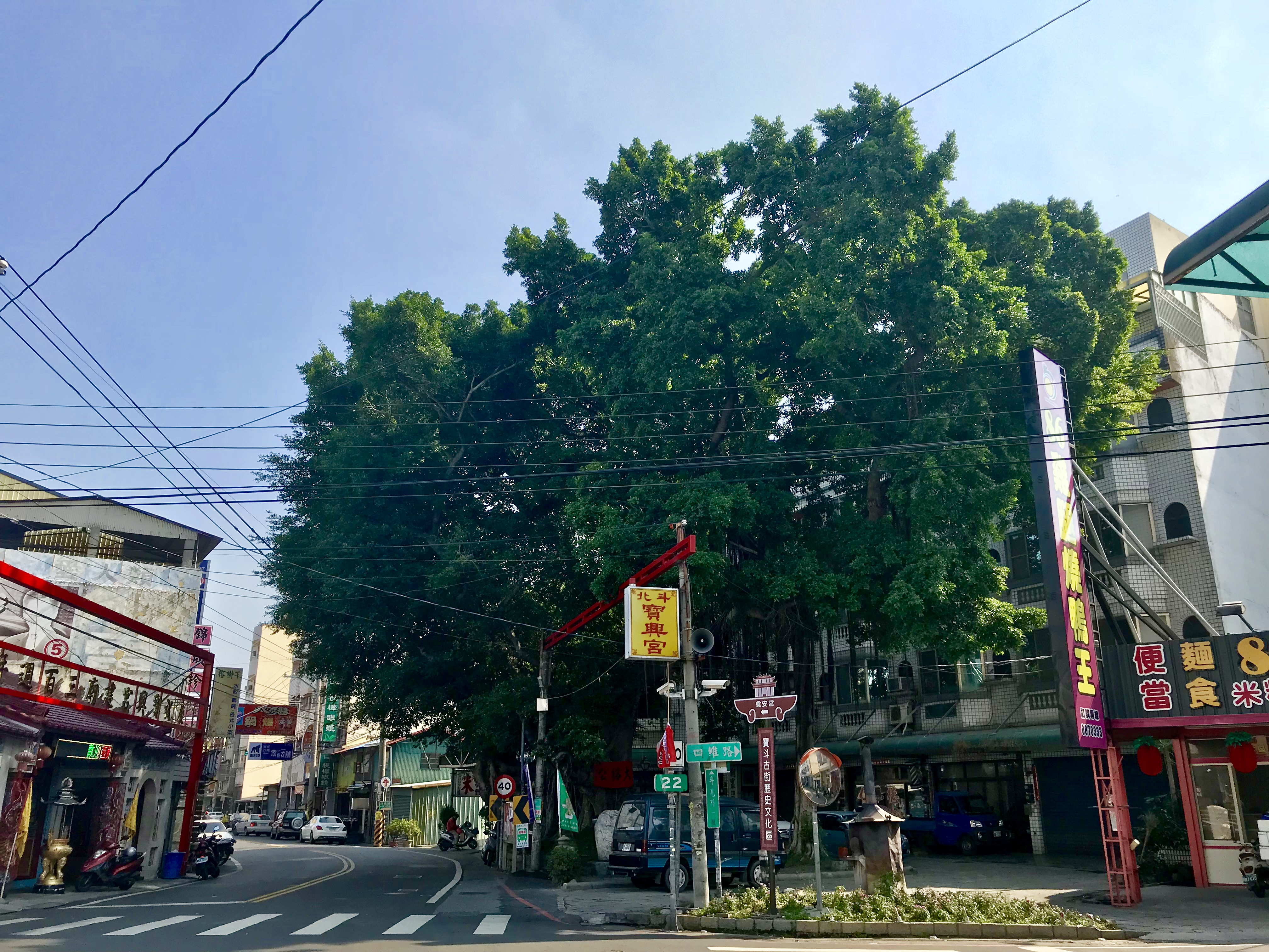 北斗寶興宮與北斗大榕樹